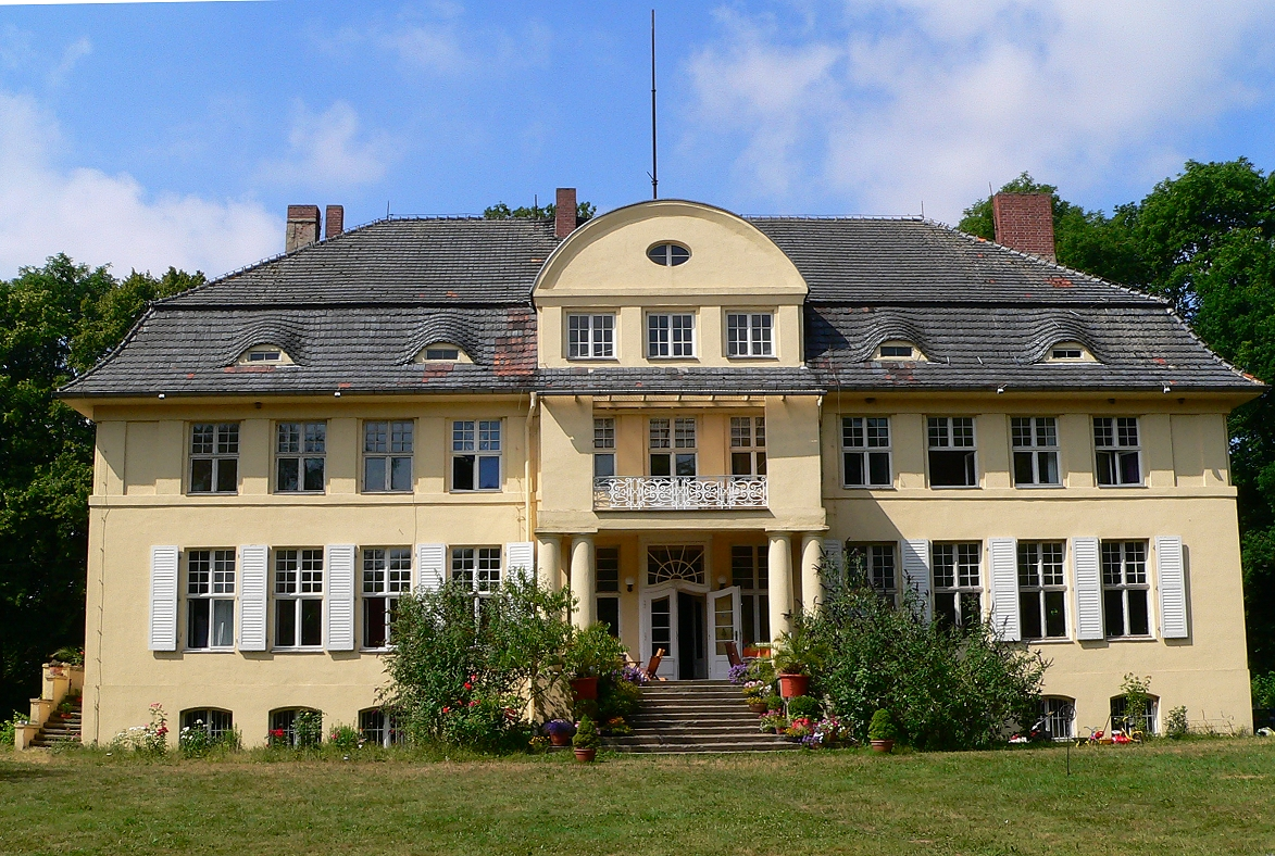 Herrenhaus auf Gut Büttelkow, Mecklenburg-Vorpommern; unter Denkmalschutz